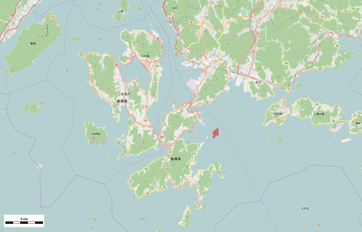 広島県呉市の情島周辺 This map may be incomplete, and may contain errors. Don't rely solely on it for navigation.